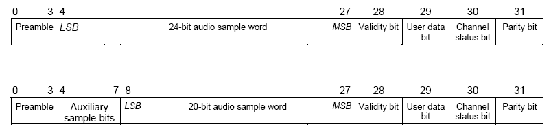 Time slots d'un subframe de AES/EBU i S/PDIF